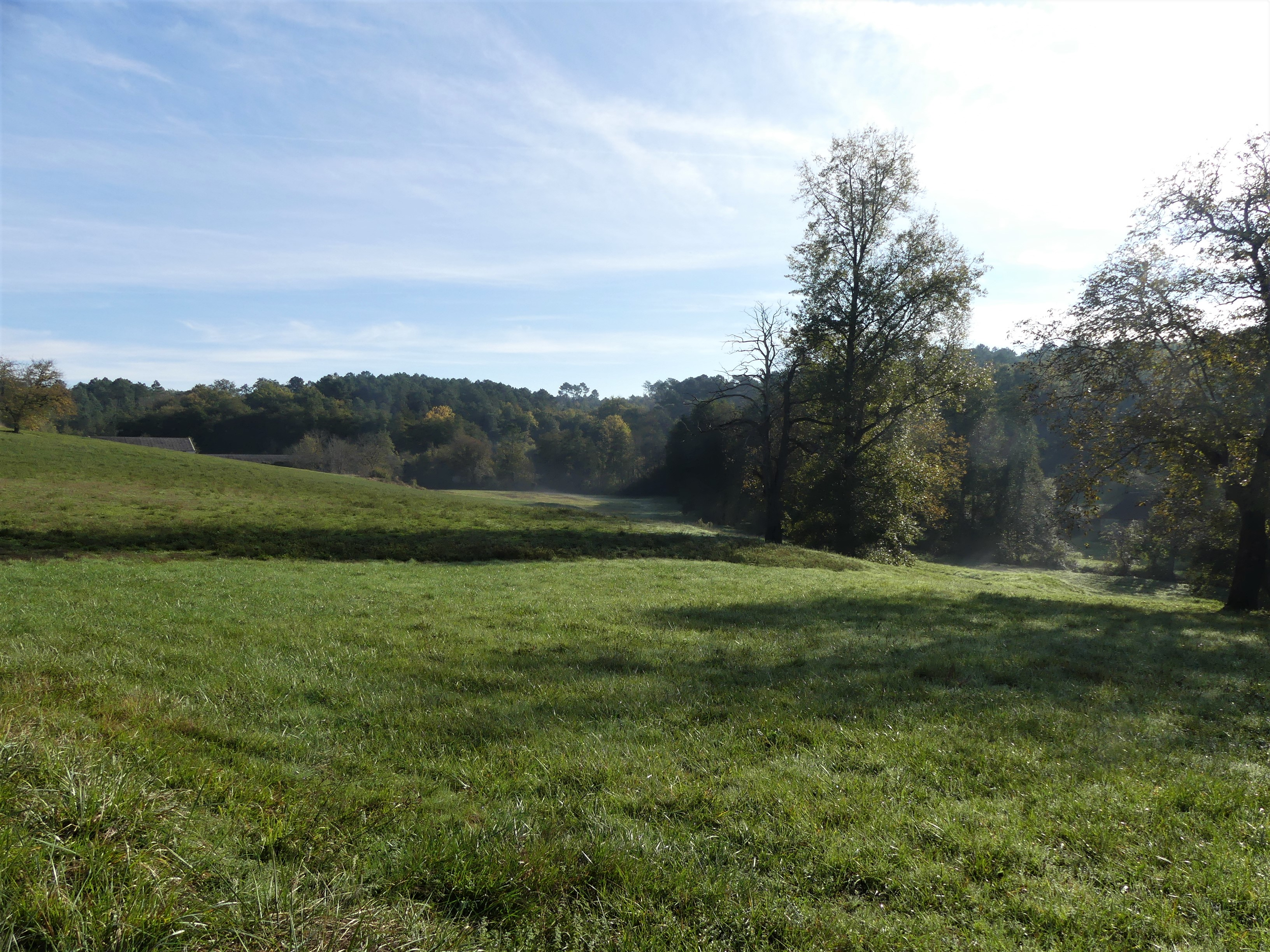 La vallée de l'Eyraud au nord-est du bourg de Laveyssière, Dordogne, France.